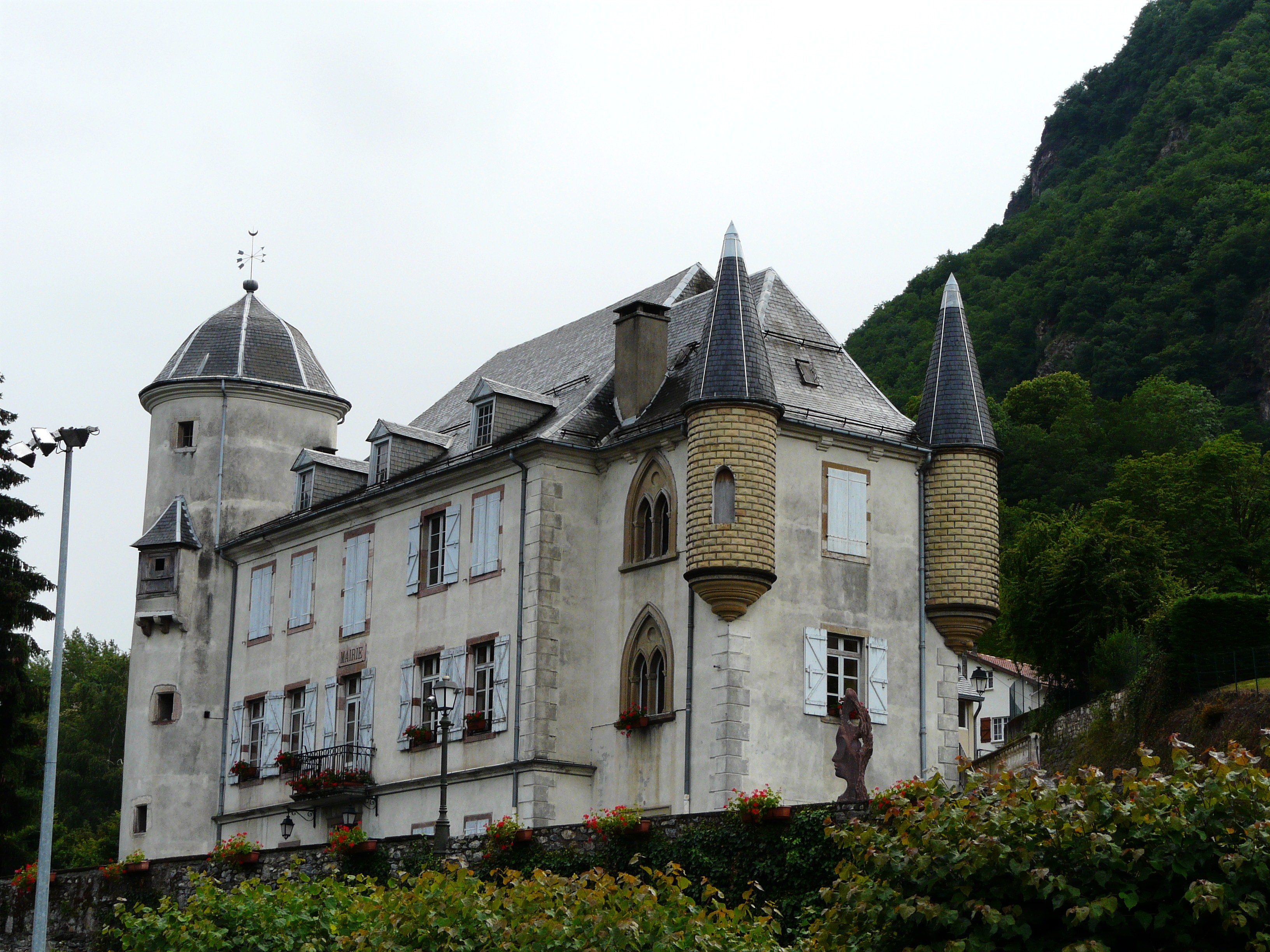 Le château de Cierp, Cierp-Gaud, Haute-Garonne, France.